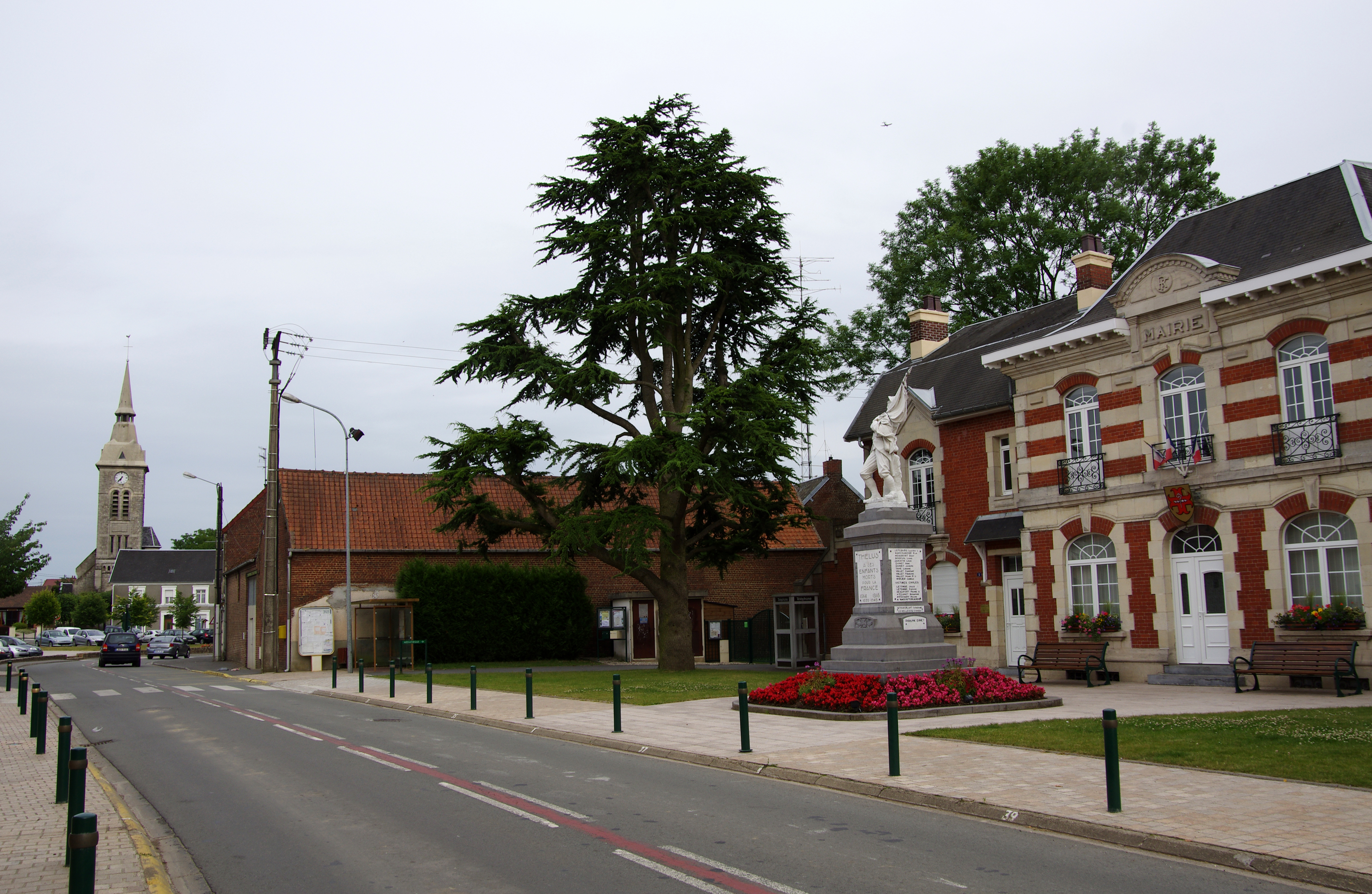 Thélus (Pas-de-Calais, France) - Le centre de la commune, avec l'église, la mairie et le monument-aux-morts. .